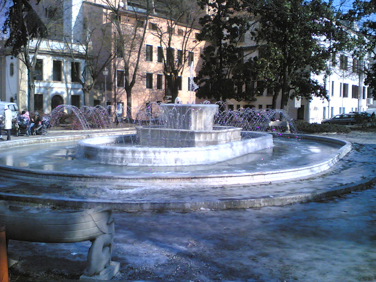 Fontana di Piazza Umberto Merlin, Rovigo.